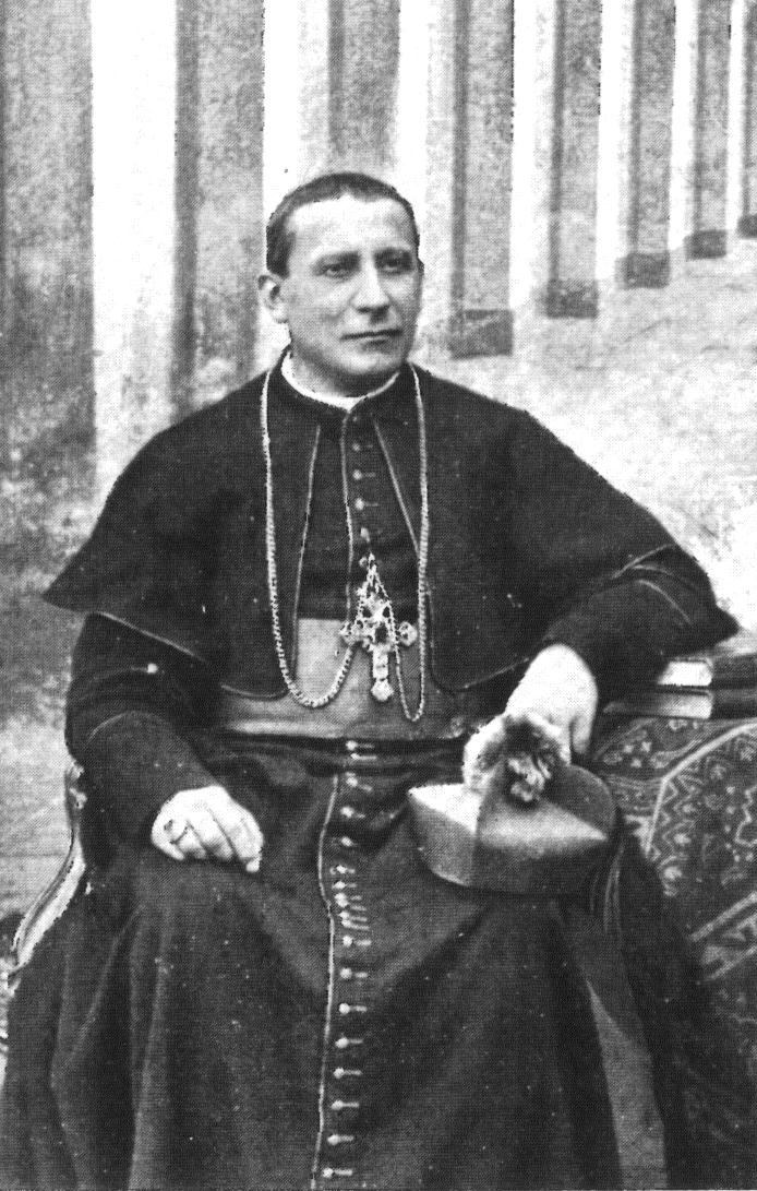 Cardinal Giuseppe Gamba, archevêque de Turin